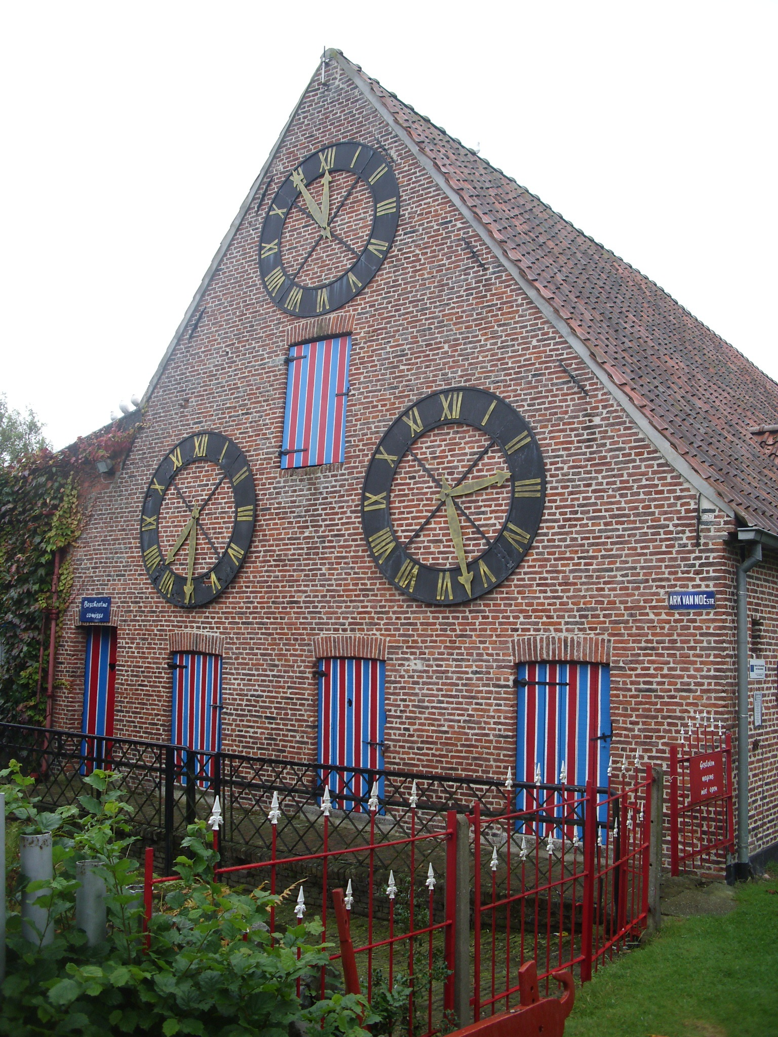 Zijgevel van de schuur van het heemkundig Bardelaeremuseum - Ledestraat 42 - Lembeke - Kaprijke - Oost-Vlaanderen - België